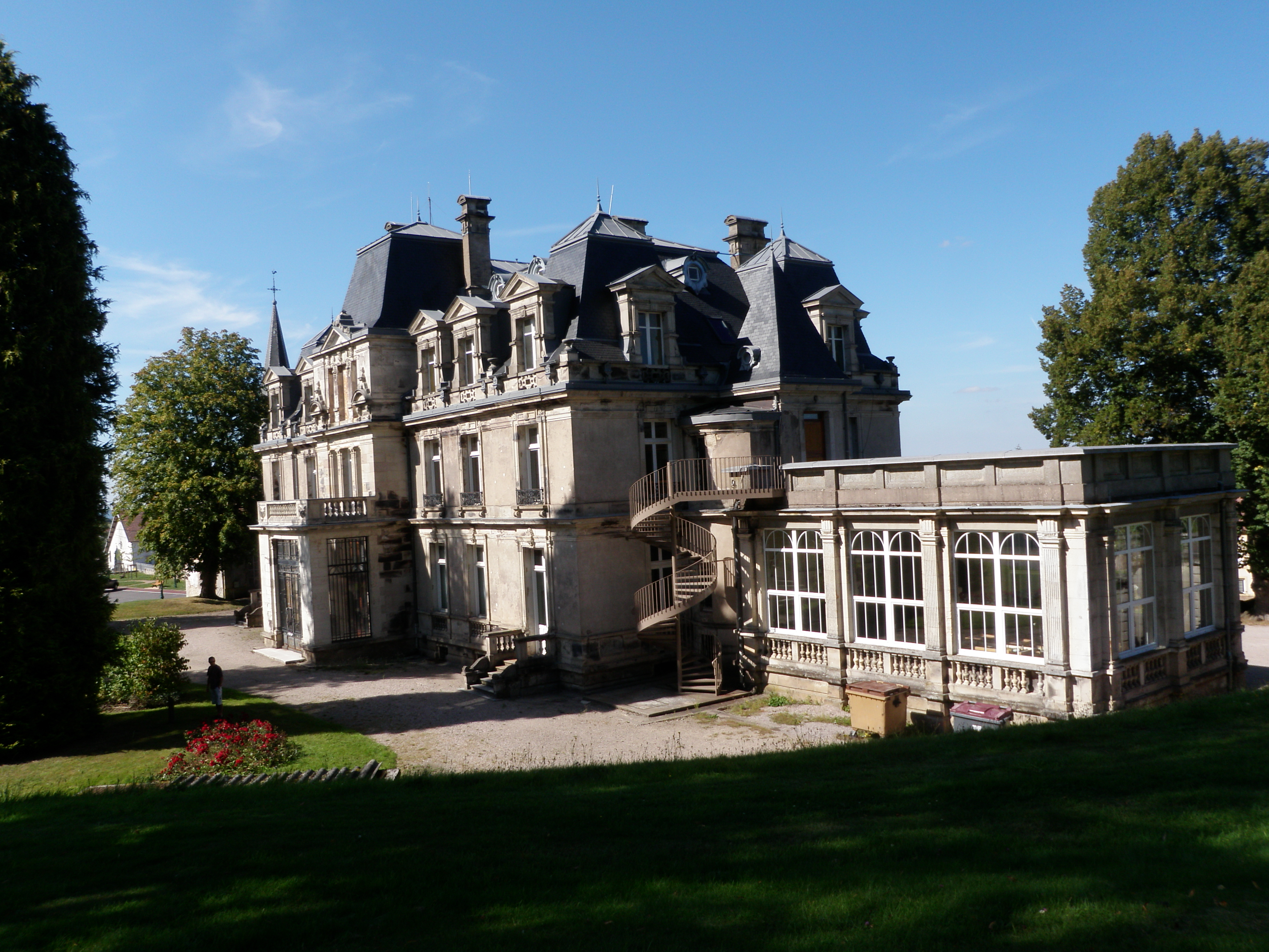 Façade sud